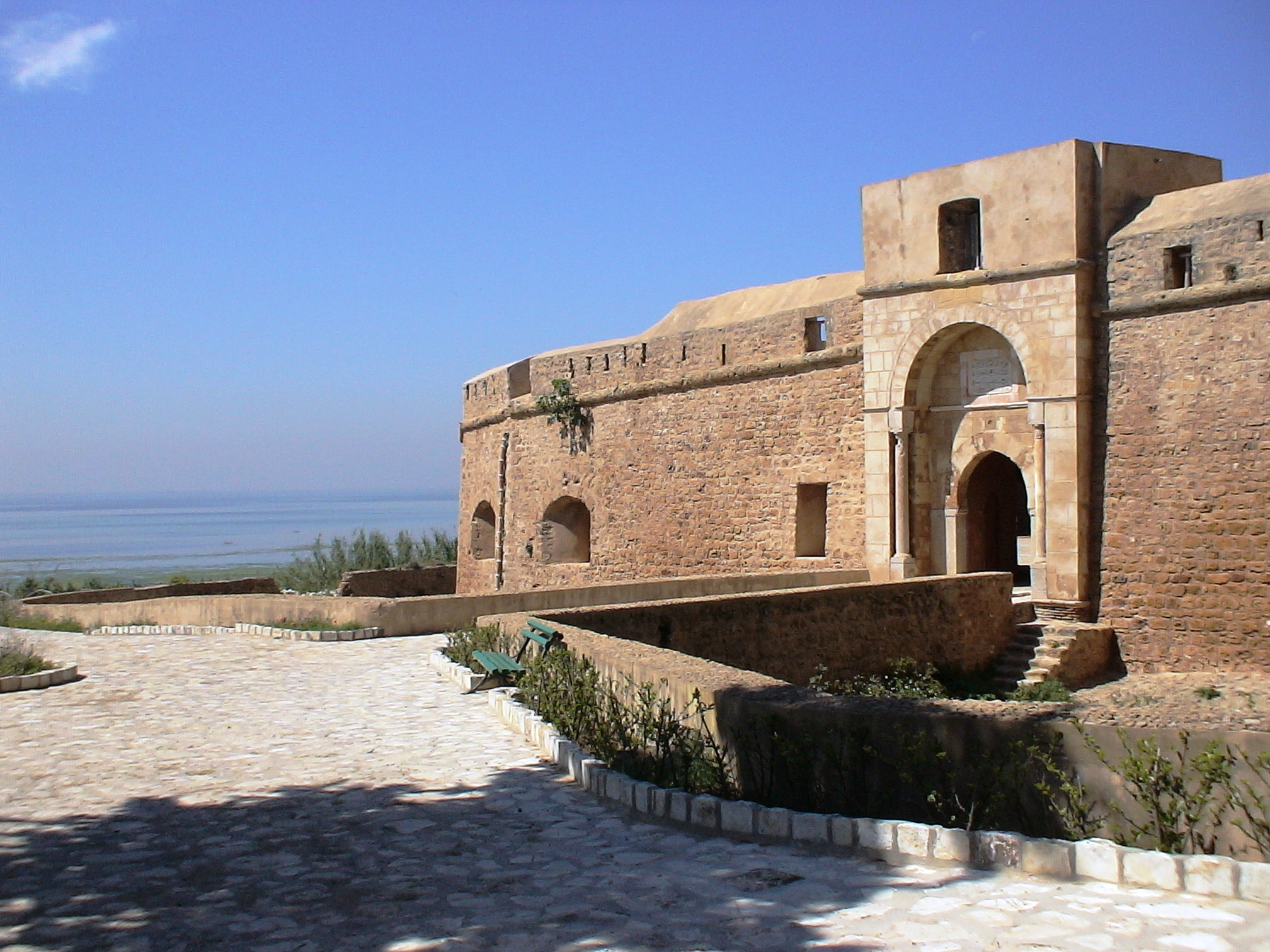 Borj El Lazarith (Ghar El Melh)